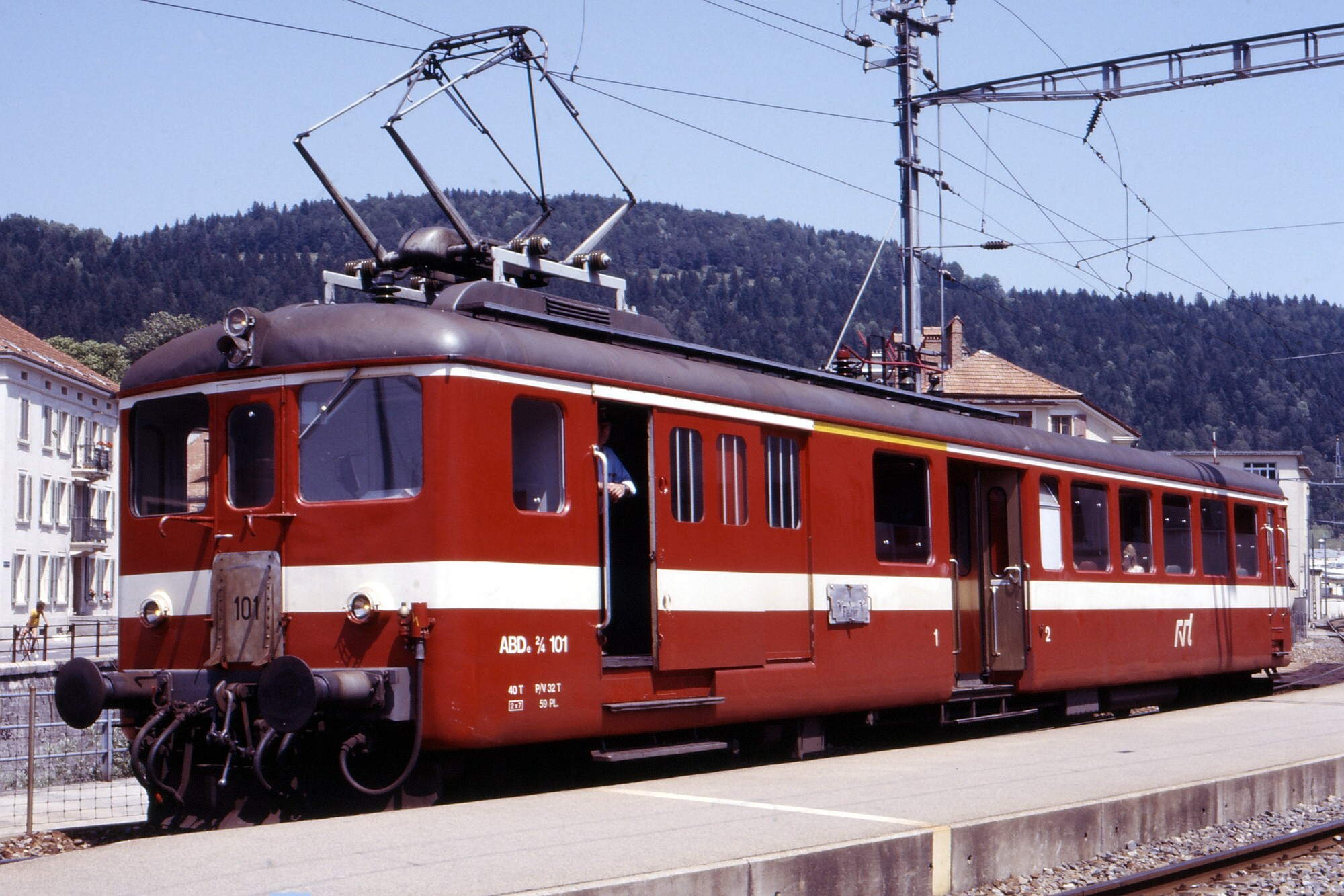 RVT Switzerland ABDe 2/4 101